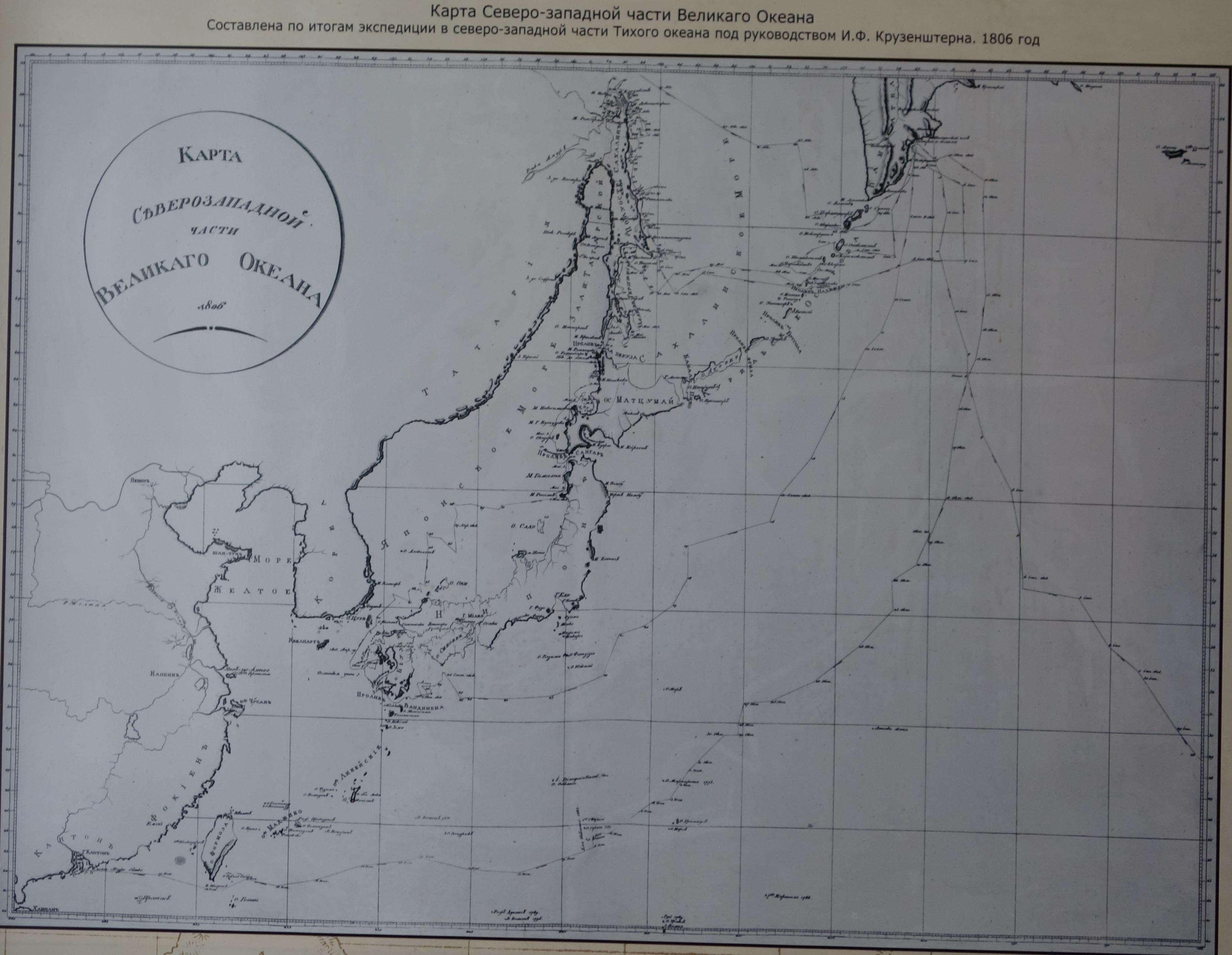 Карта Сахалина, составленная И.Ф. Крузенштерном в 1806 г. Снимок из экспозиции Сахалинского краеведческого музея.